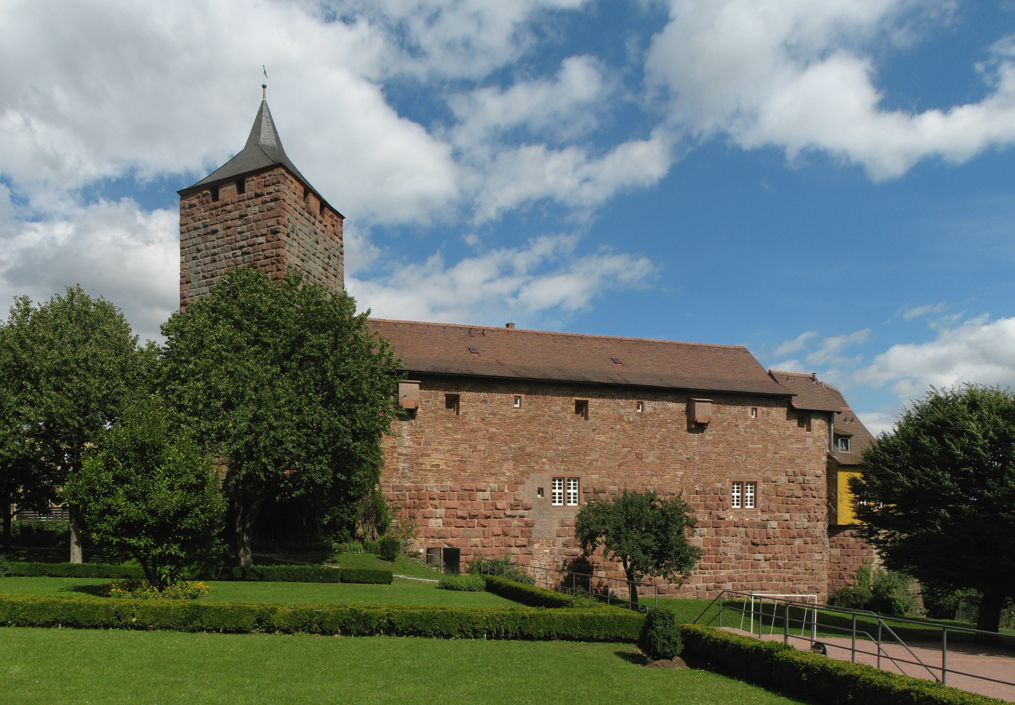 Burg Rothenfels von der Westseite.